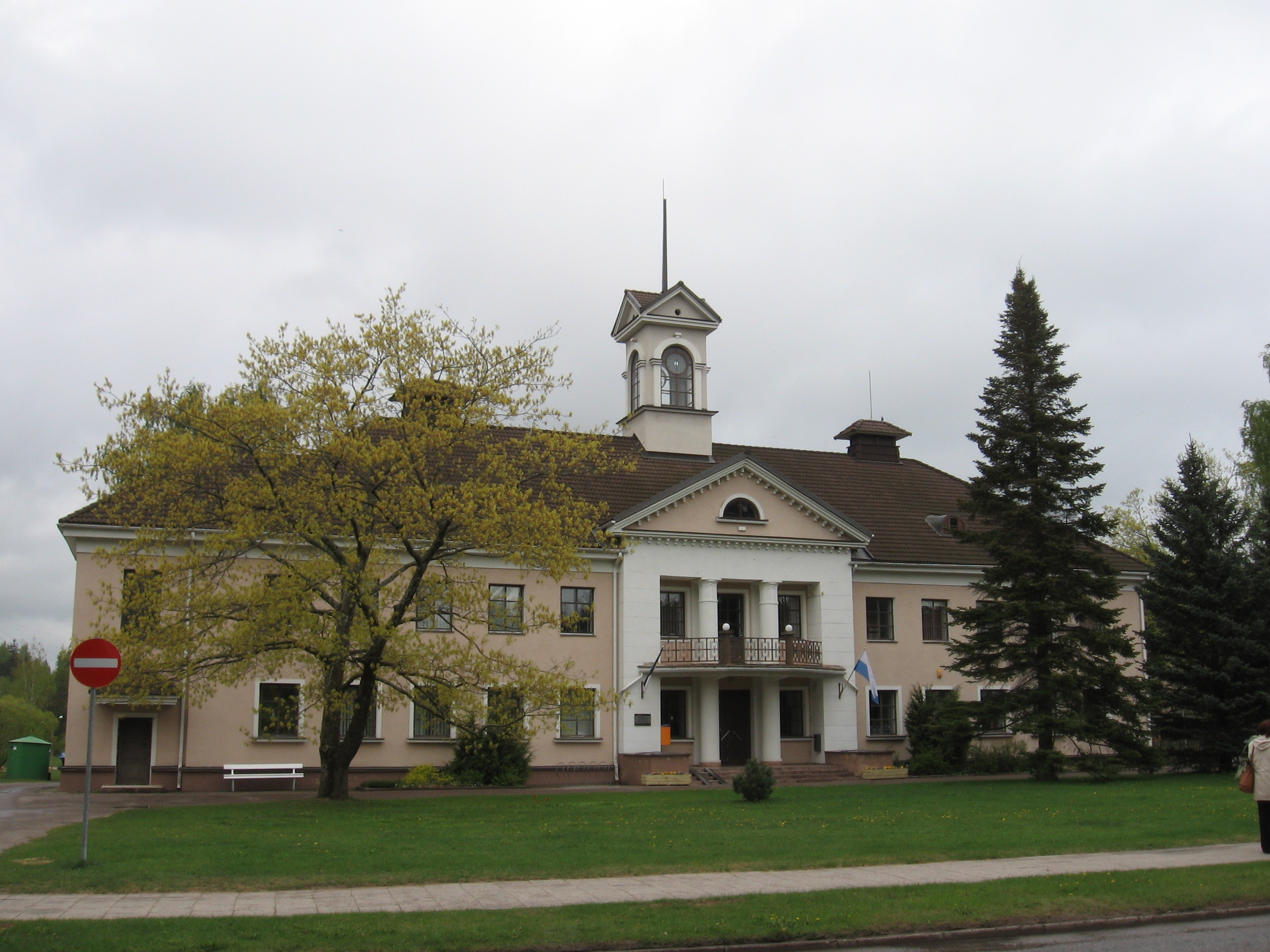 Elva linnavalitsuse hoone